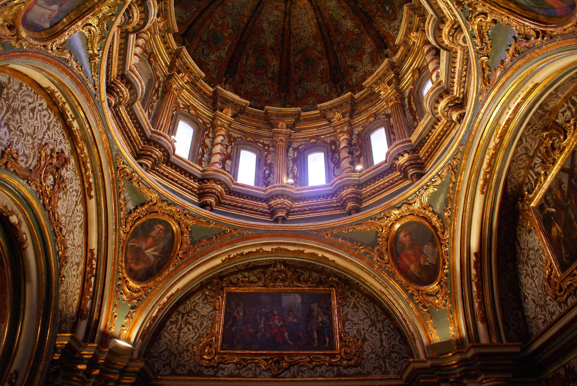 Camarín del Cristo de la Antigua, en el Santuario de Nuestra Señora de la Encarnación en Tobarra (Albacete, España).